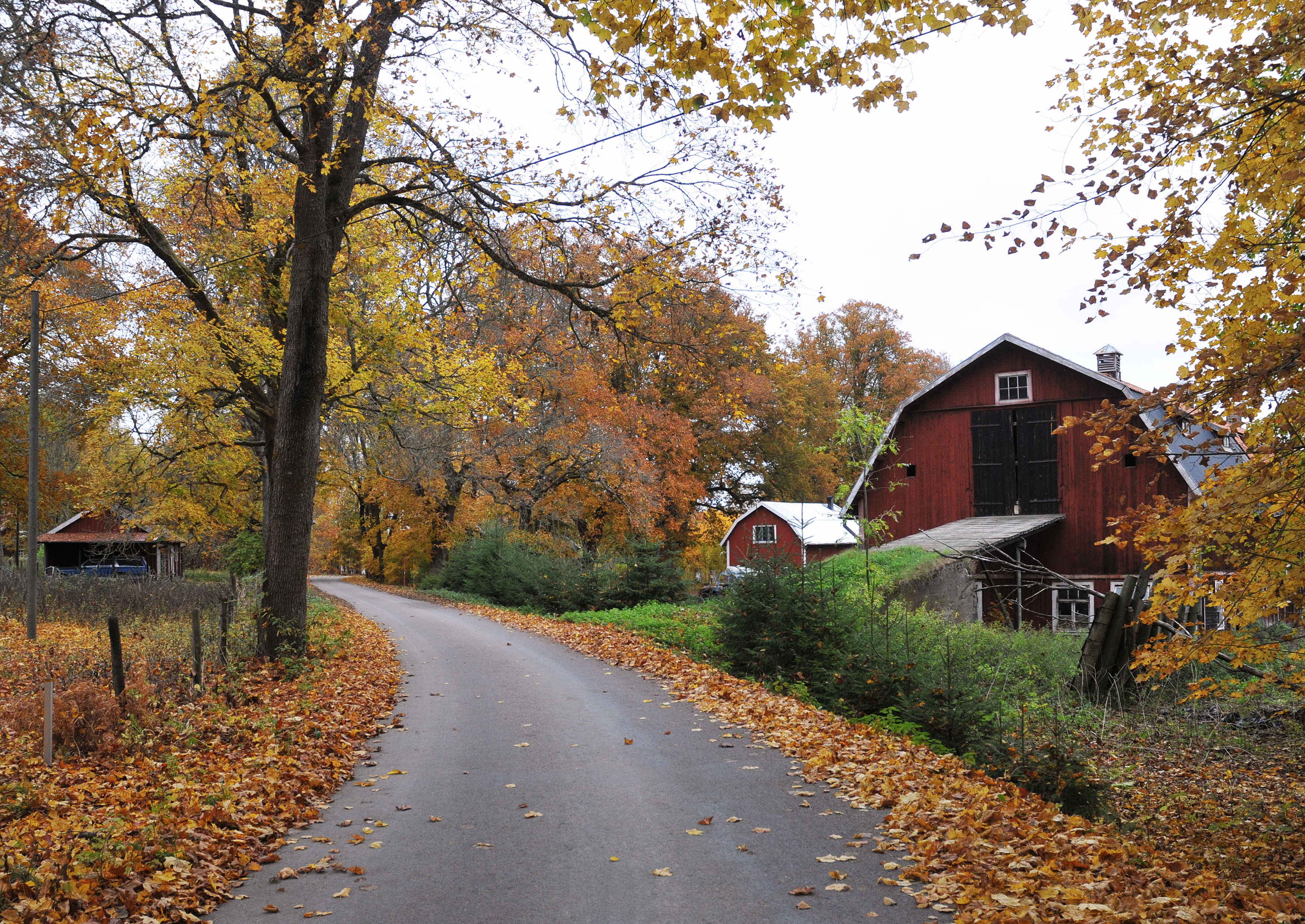 Bärbo by i Bärbo socken, 2013.